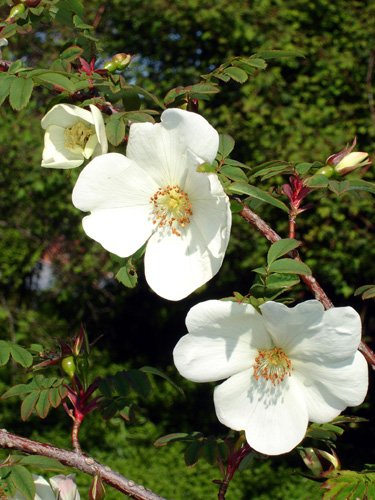 Rosa sericea subsp. omeiensis